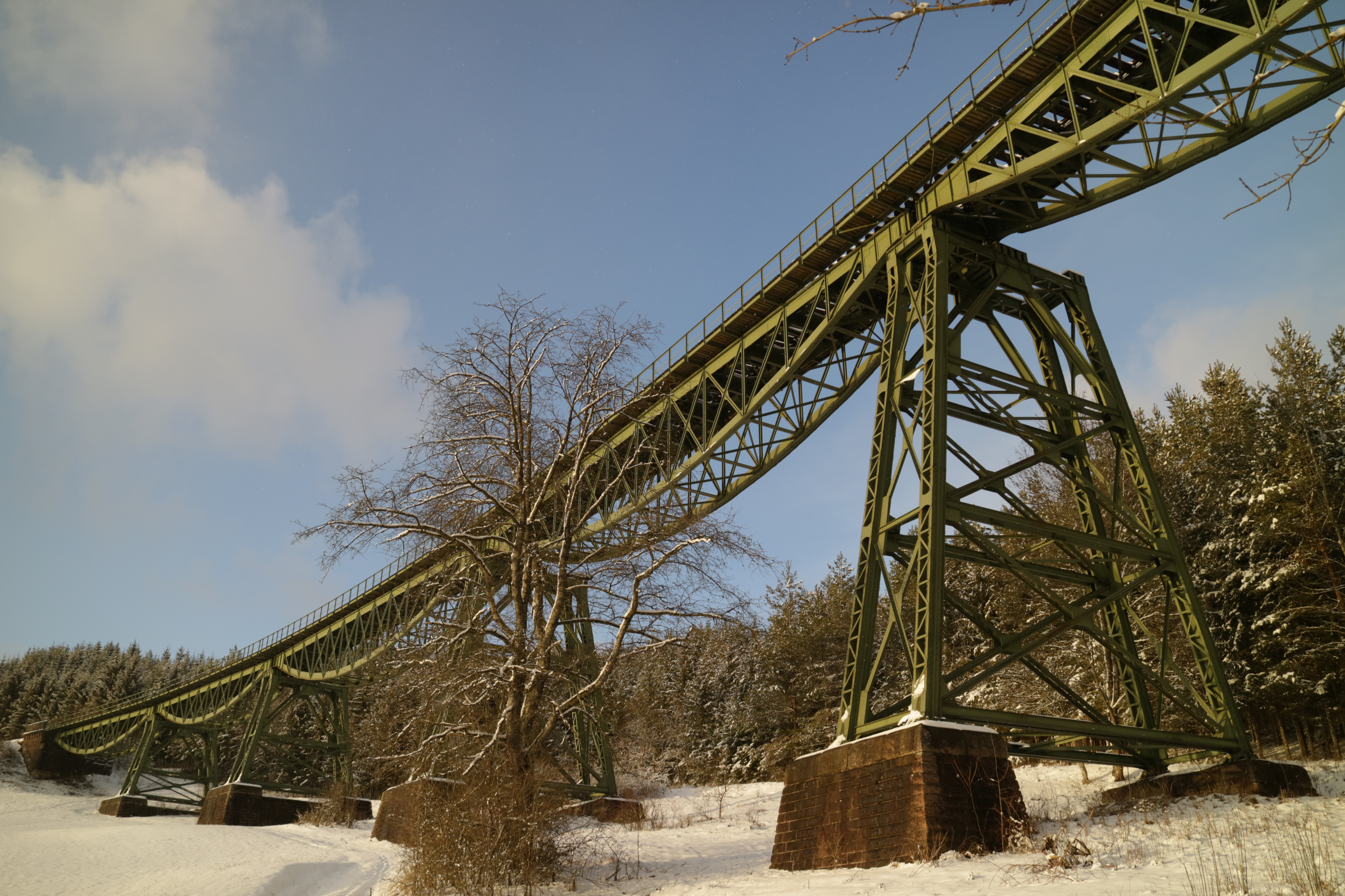 Biesenbachviadukt bei Epfenhofen.